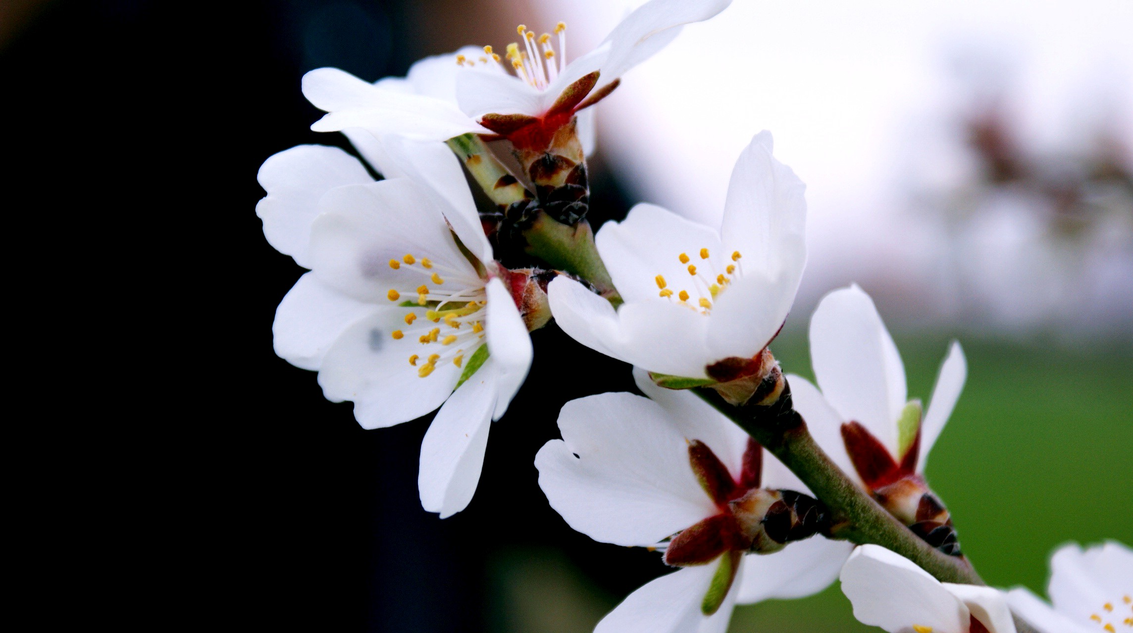 Encuadre horizontal